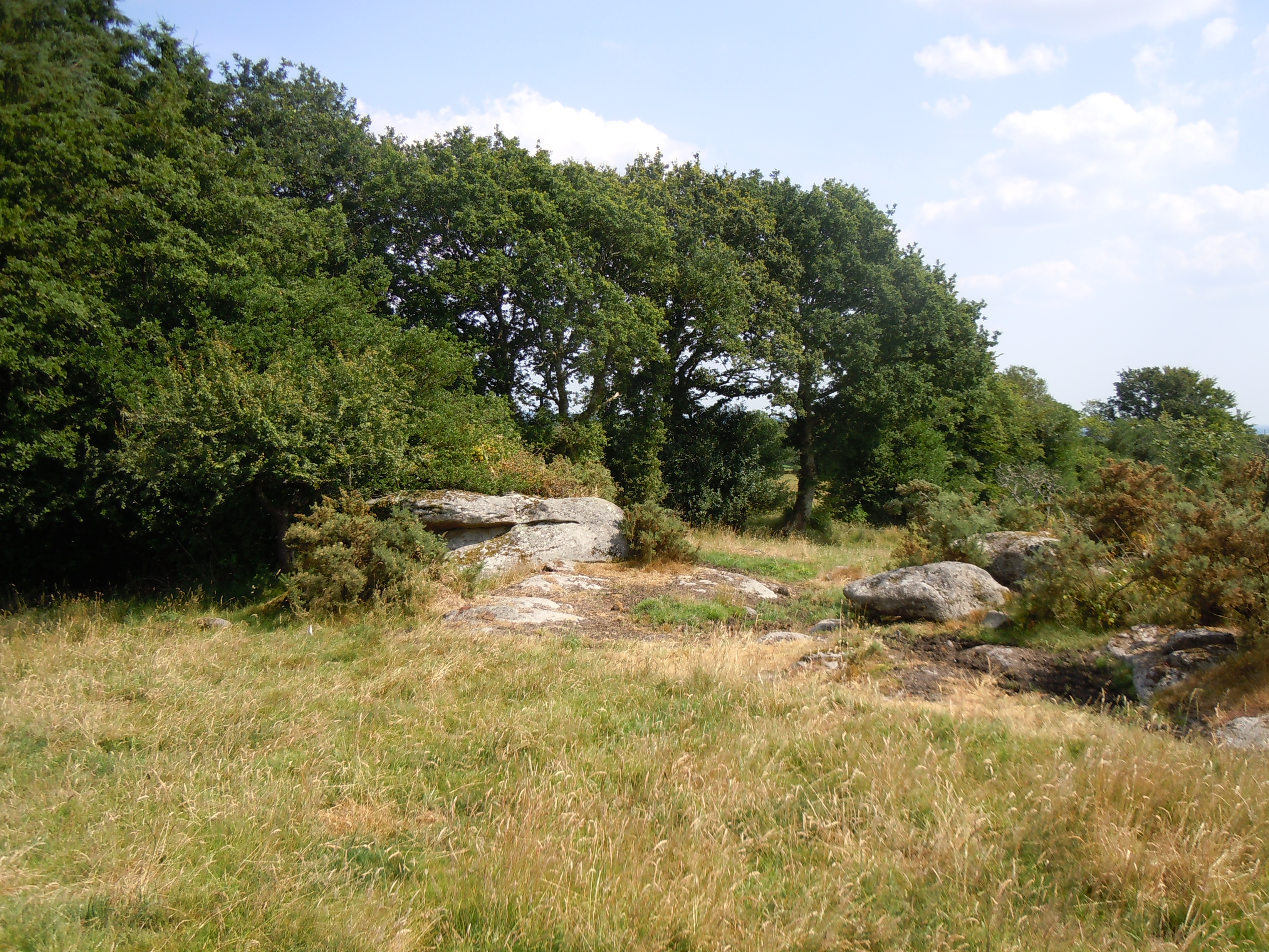 rochers granitiques de Miné Bibon à Guiscriff (Morbihan)